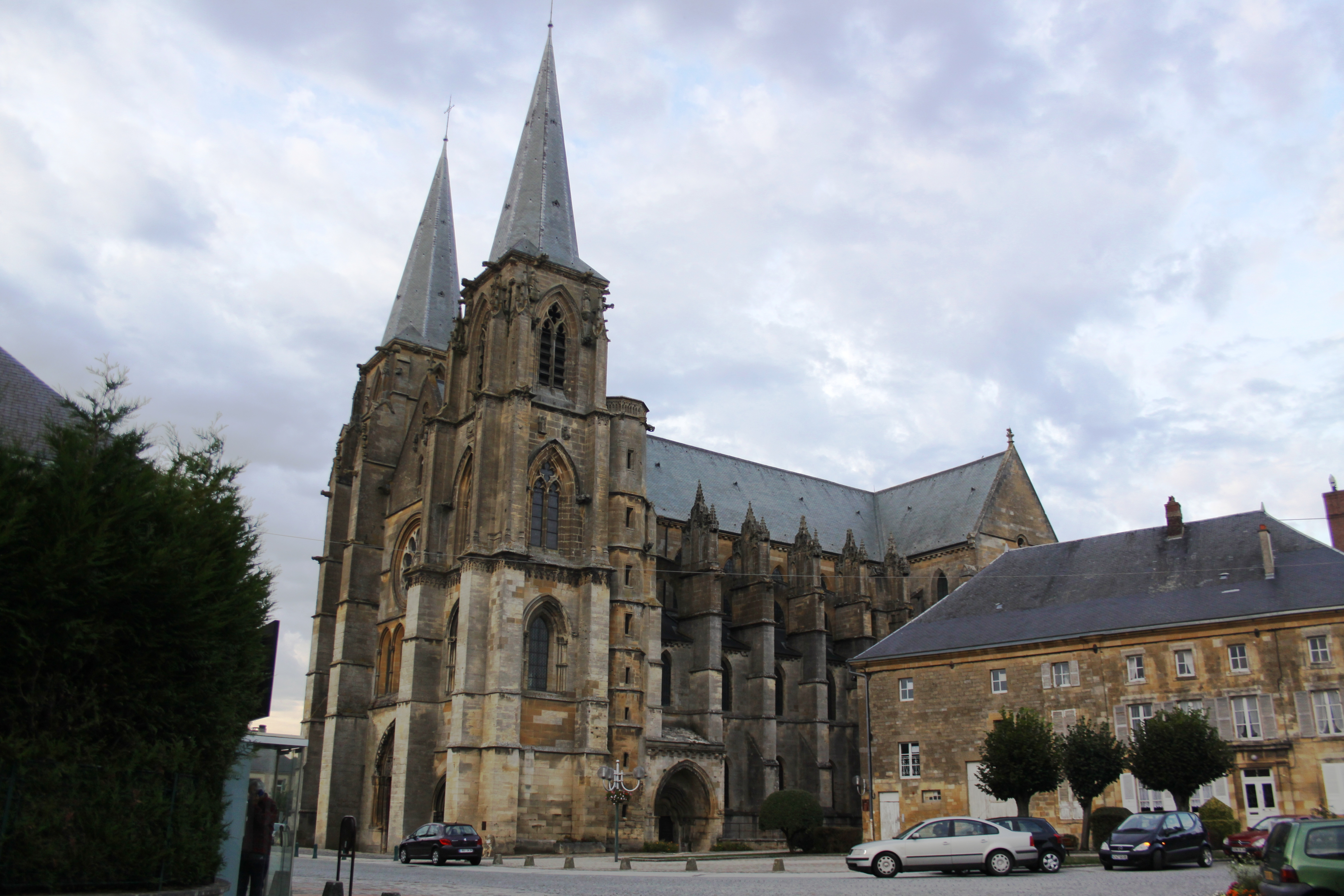 Mouzon (08 Ardennes) - l’ Église abbatiale Notre-Dame .